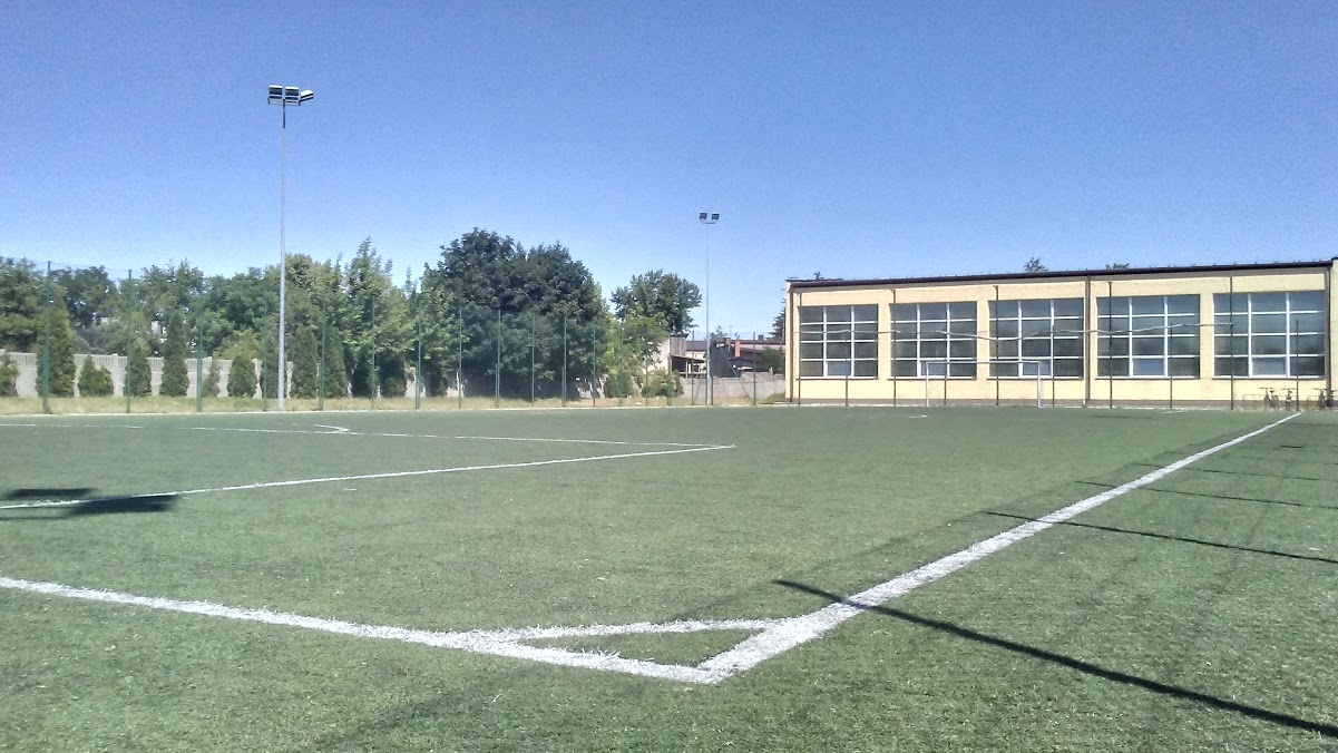 Boisko do pilki noznej III LO im. płk. Stanisława Hojnowskiego w Tomaszowie Mazowieckim